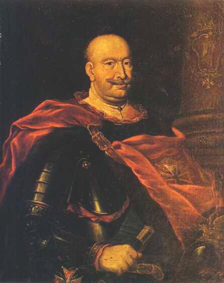 Jan Tarło